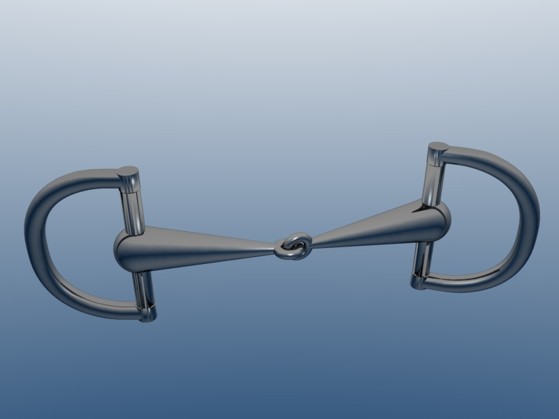 a snuffle bit with D ring. Un mors Verdun, avec ses anneaux en D caractéristiques. Modélisé sous Blender par LardonCru.